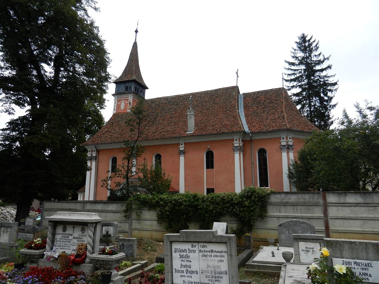 Ansamblul bisericii evanghelice din Obervorstadt